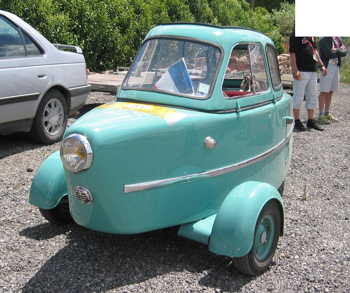 Inter